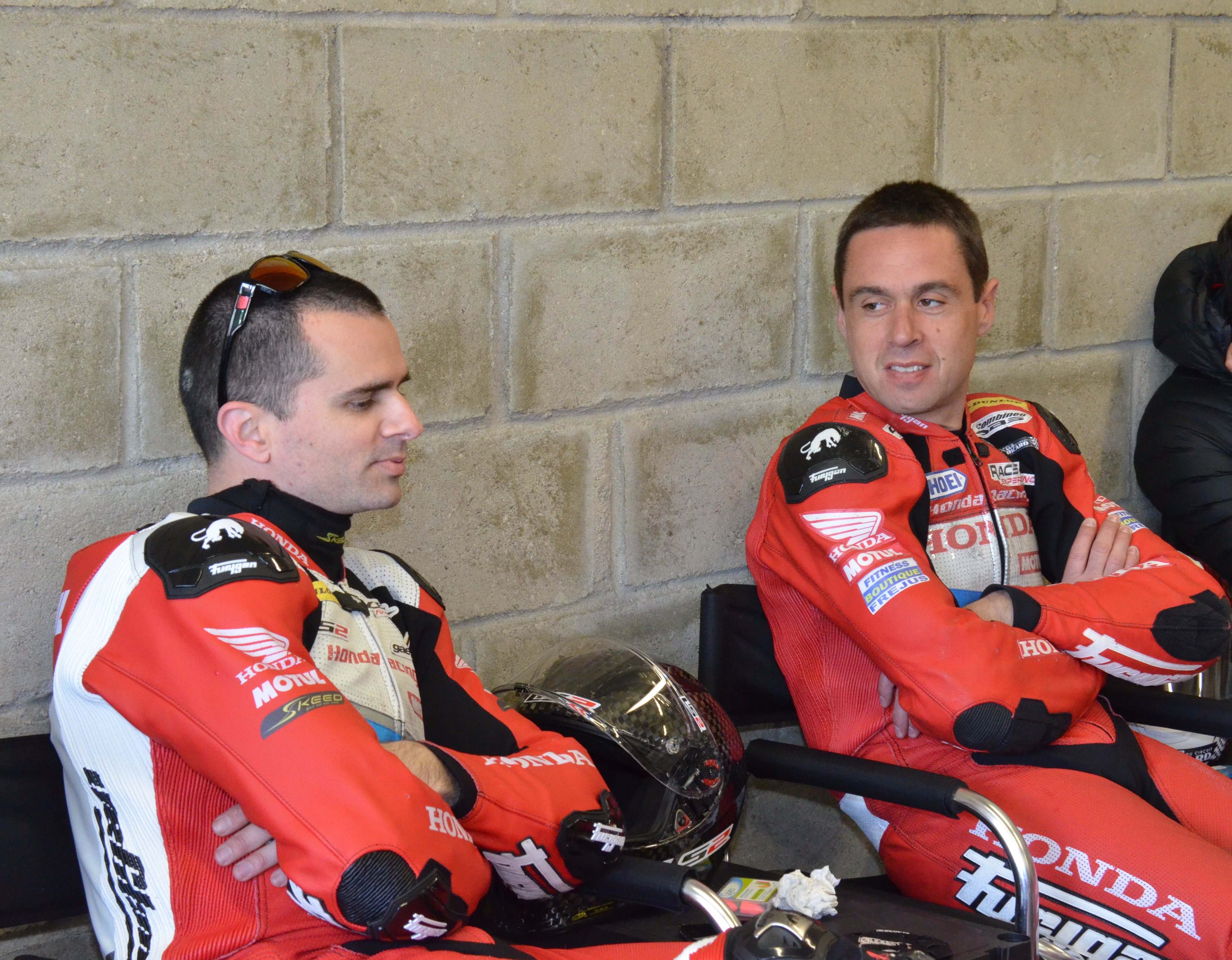 Julien DACOSTA à gauche 24 heures du Mans Moto 2016